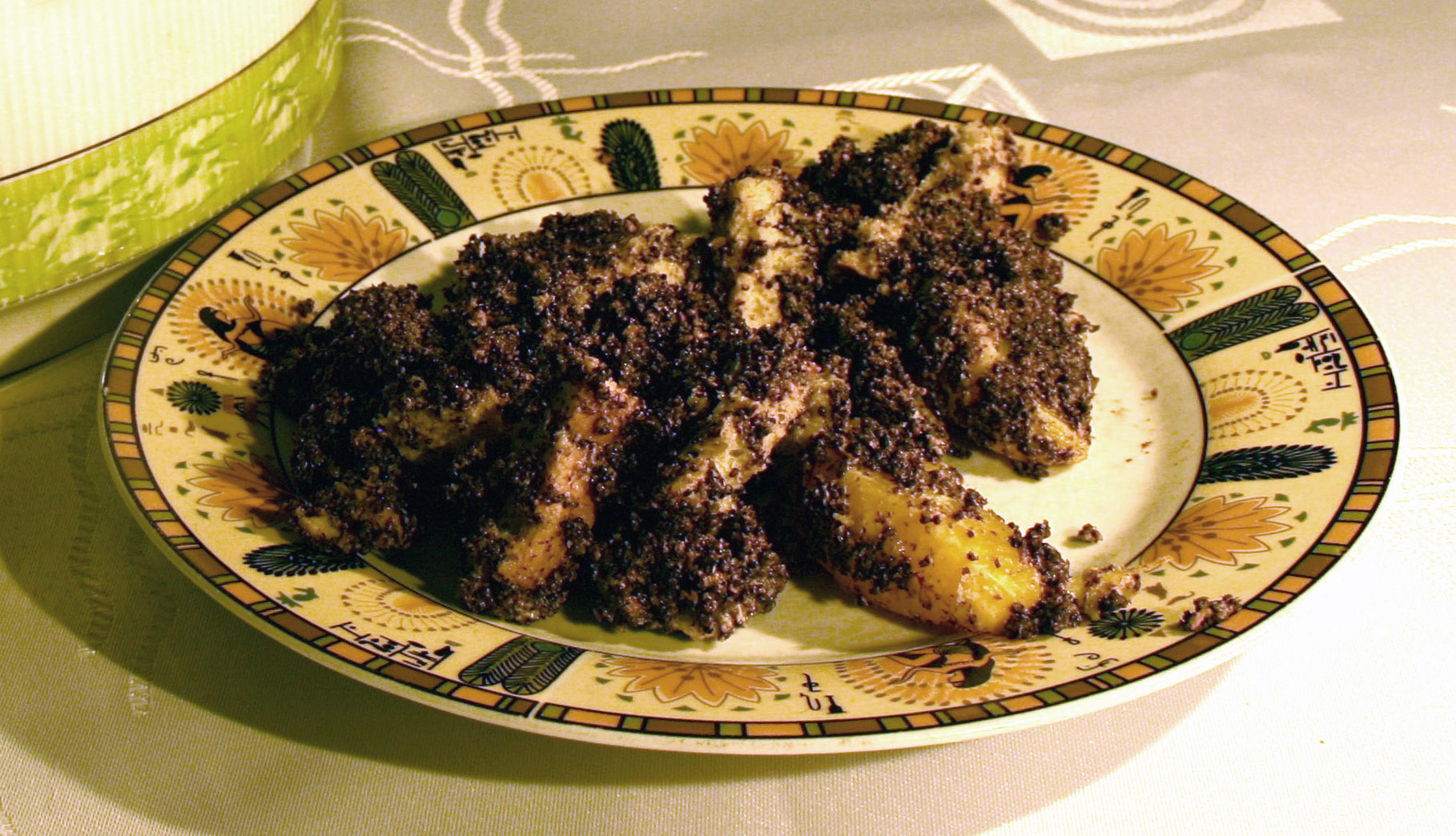 makówki - śląskie danie wigilijne